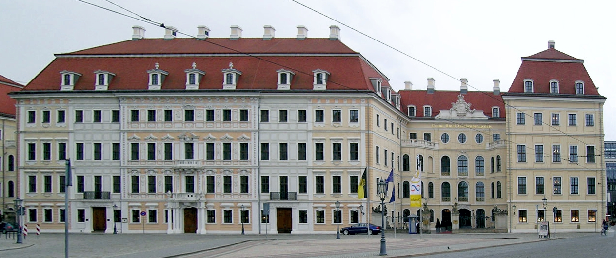 Taschenbergpalais, Am Taschenberg, Dresden, Germany. Now: Kempinski Hotel Taschenbergpalais.